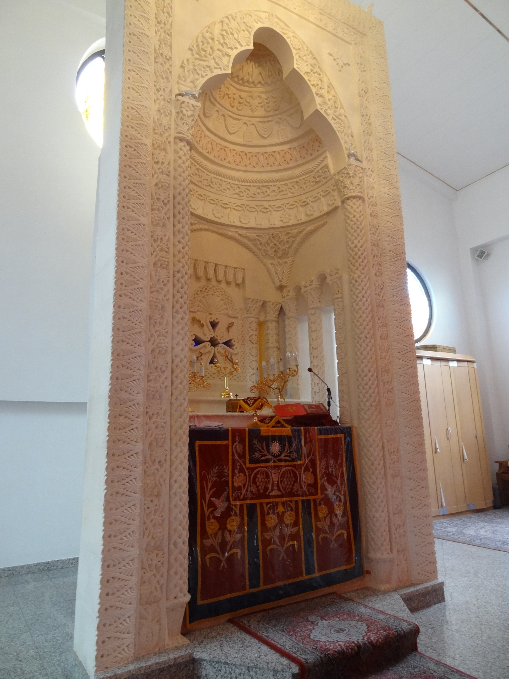 Mor Barsaumo (Garbenteich)